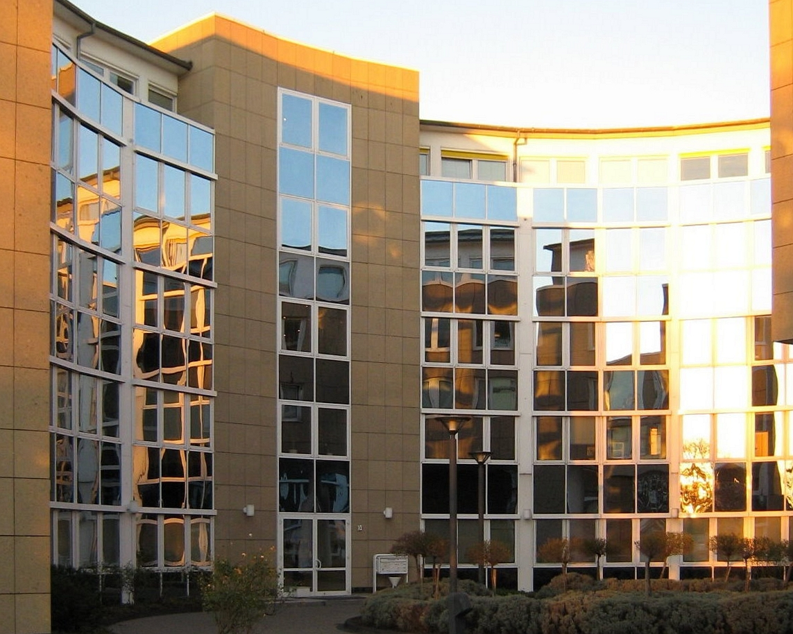 Eingang des Bundesministeriums für Familie, Senioren, Frauen und Jugend, Dienstsitz Bonn